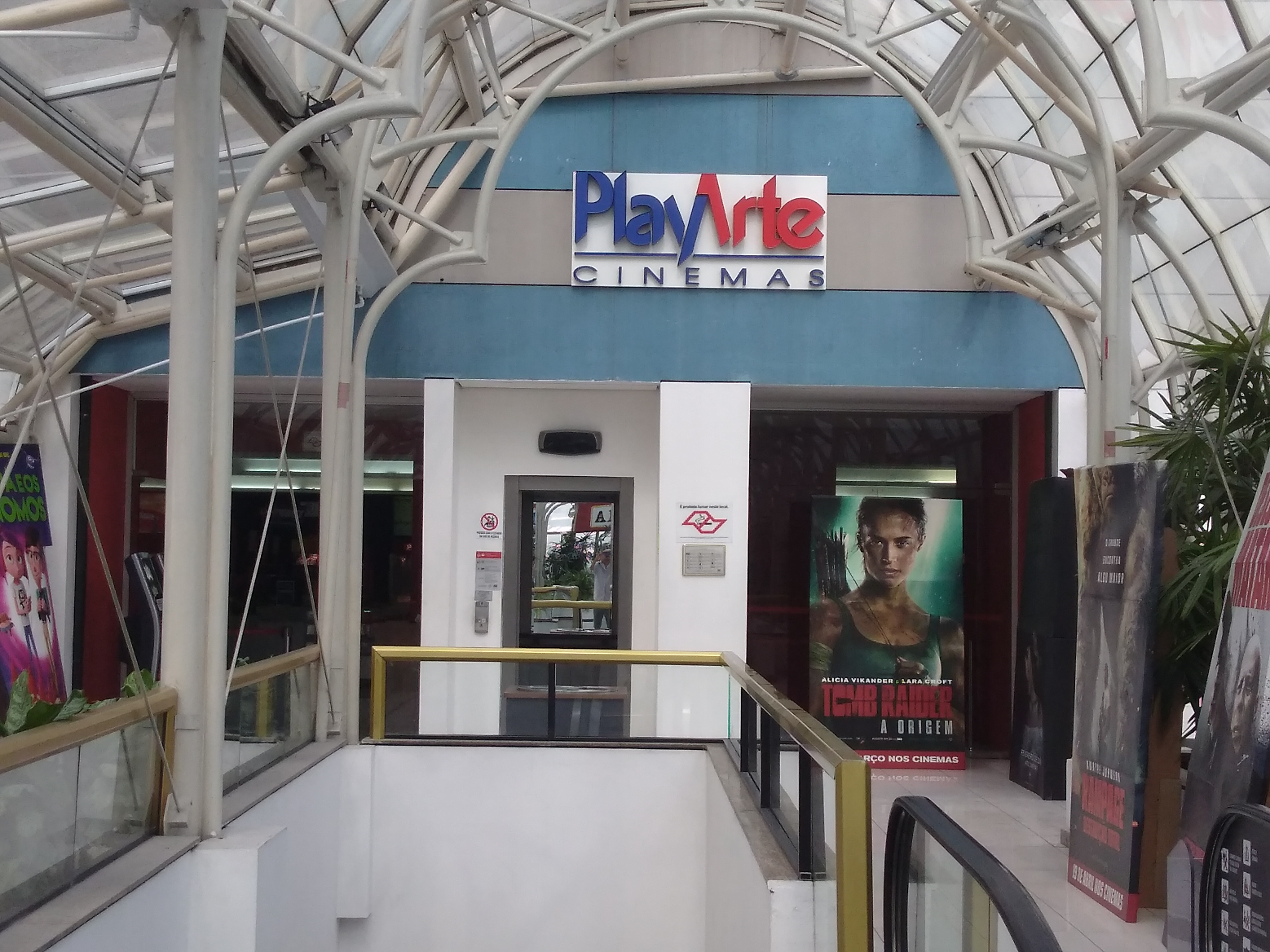 Entrada do PlayArte Plaza Sul de São Paulo,SP